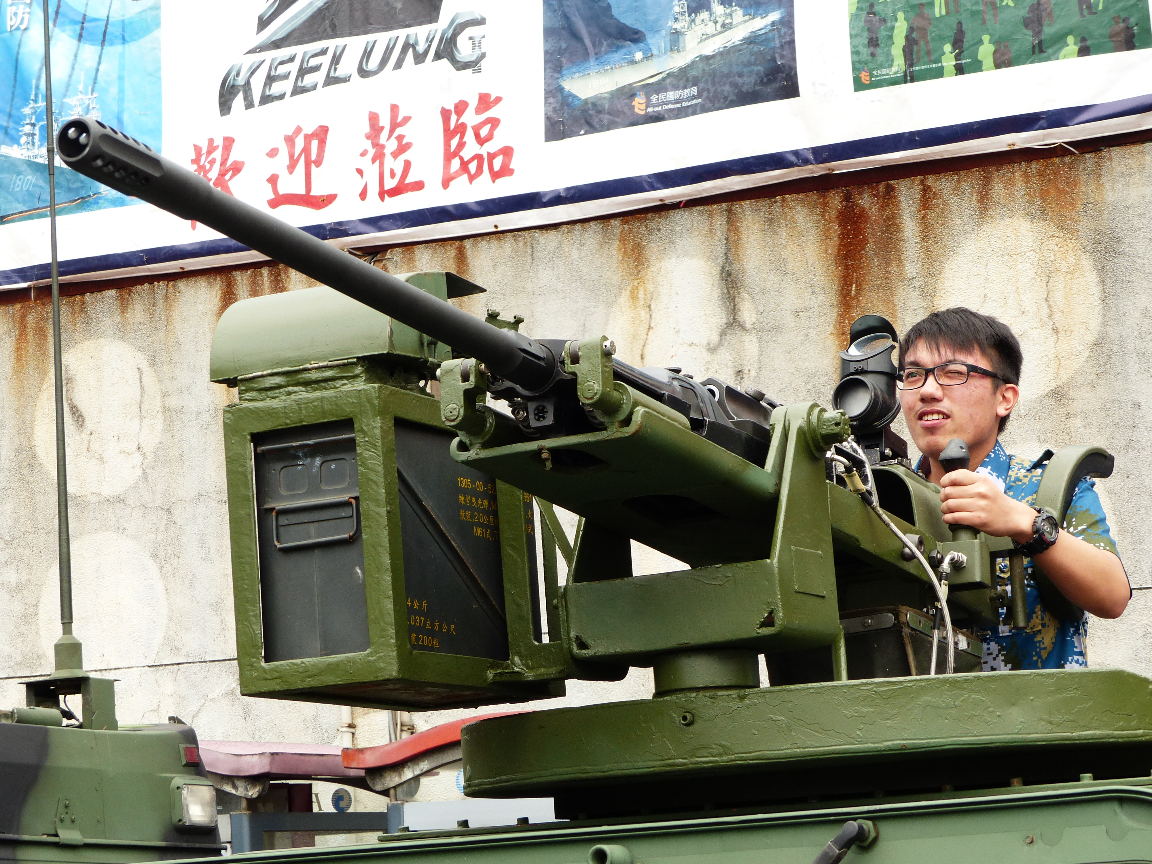 遊客體驗操作海軍陸戰隊悍馬車上的T-75M 20mm機關砲。